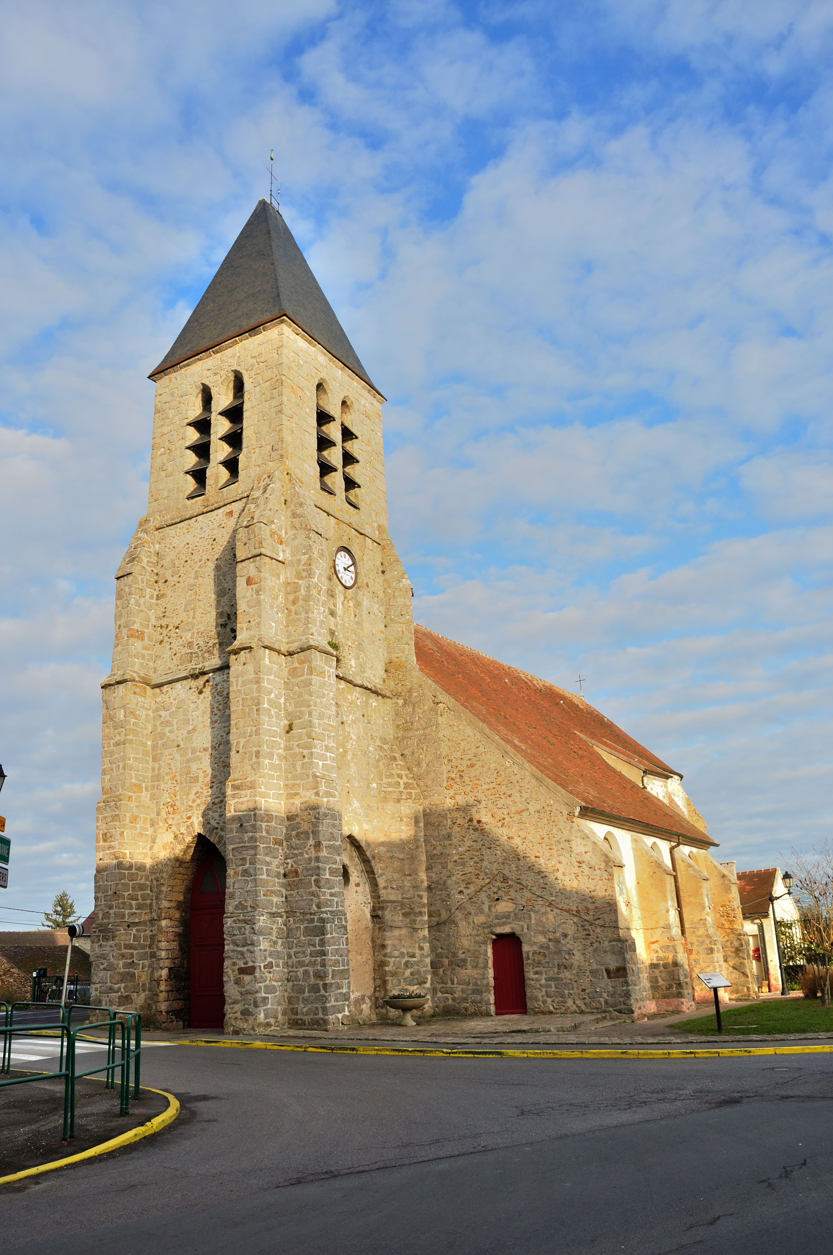 Église Saint-Médard de Chailly-en-Brie. (département de la Seine-et-Marne, région Île-de-France).